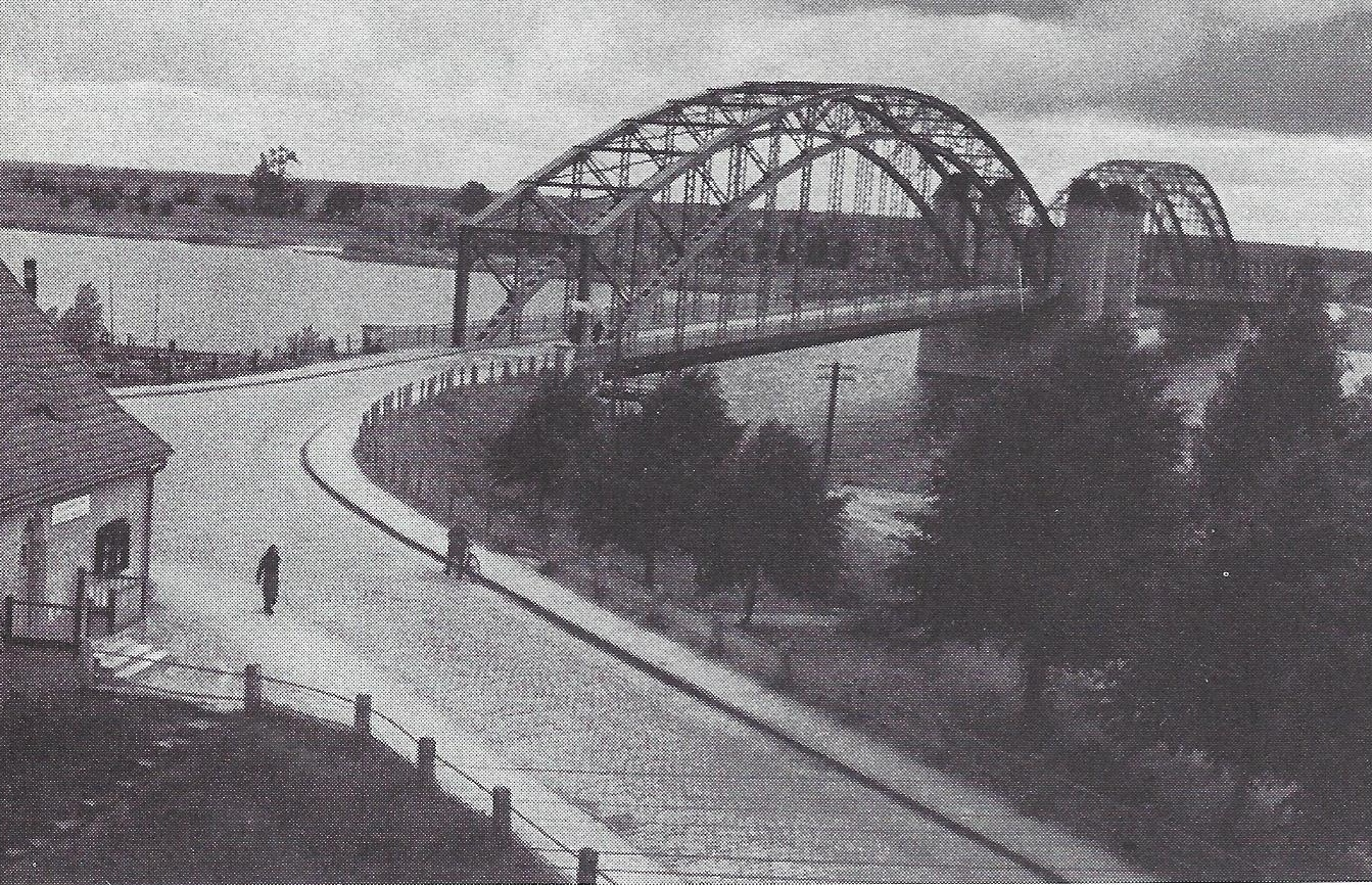 Petersbrücke mit mittiger Klappbrücke bei Ruß im Kreis Heydekrug .